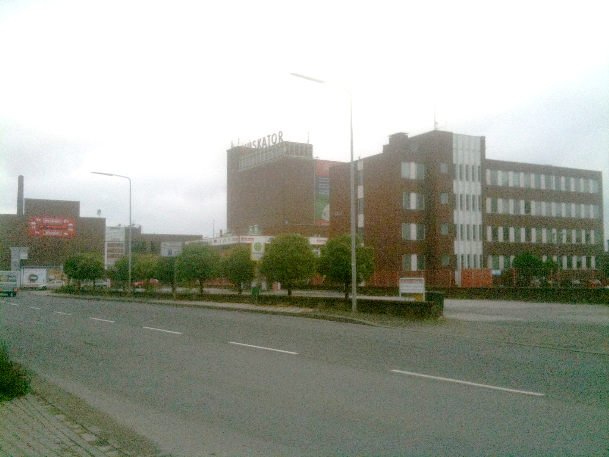 Muskatorwerk Düsseldorf, Firmensitz, Tankstelle